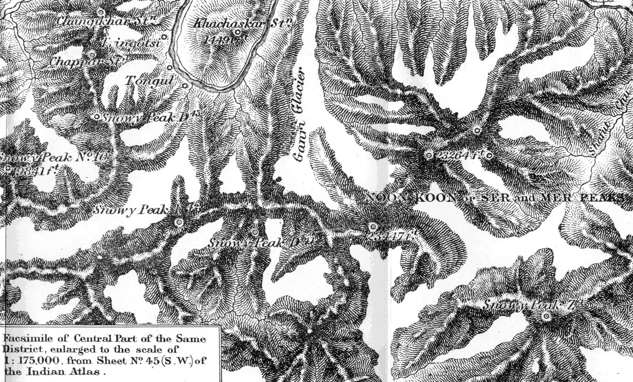 Karte des Nun-Kun-Massivs Sheet No.45 SW des Indian Atlas aus dem Jahre 1881